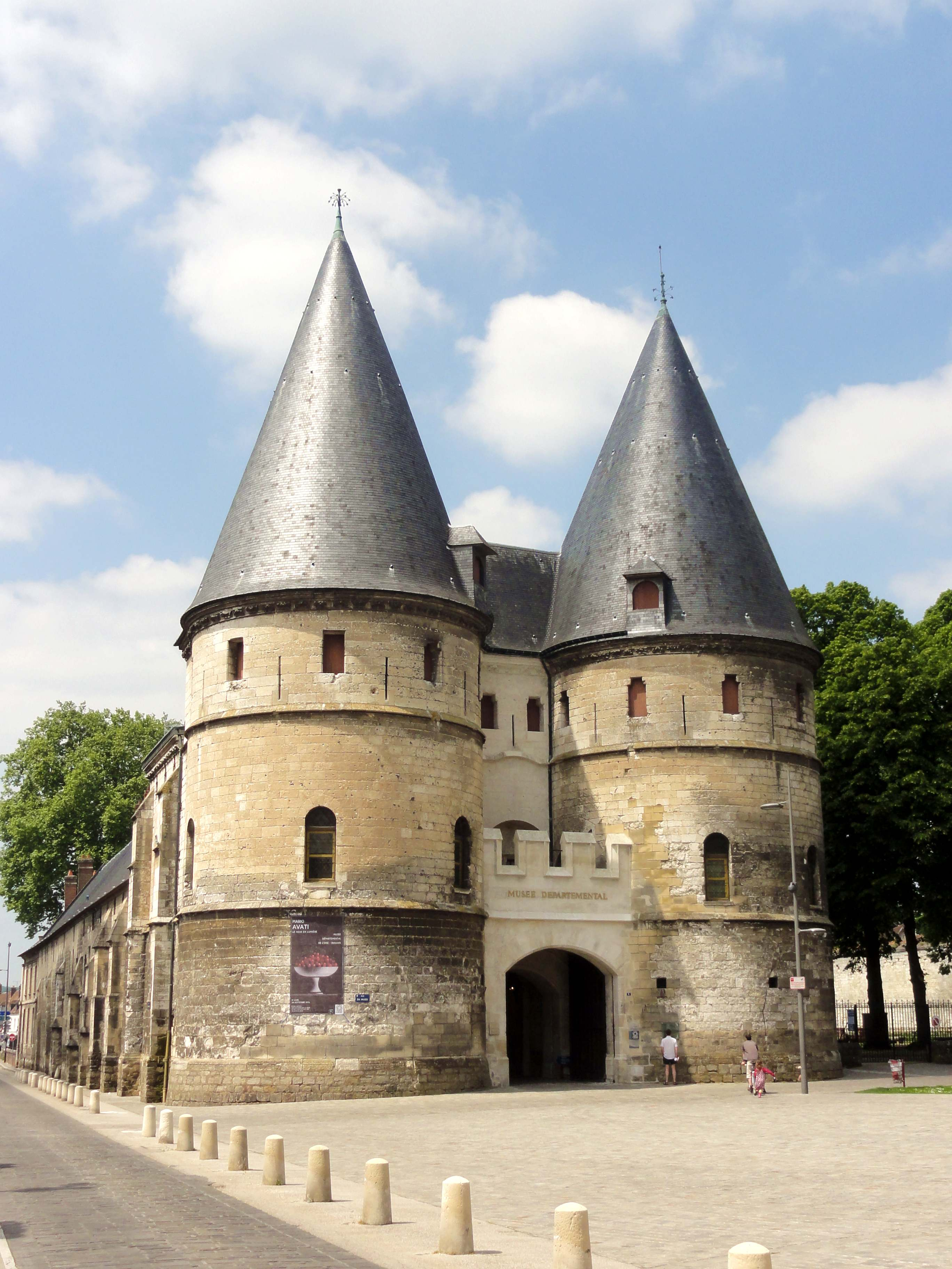 Ancien palais épiscopal - musée départemental de l'Oise, châtelet d'entrée.